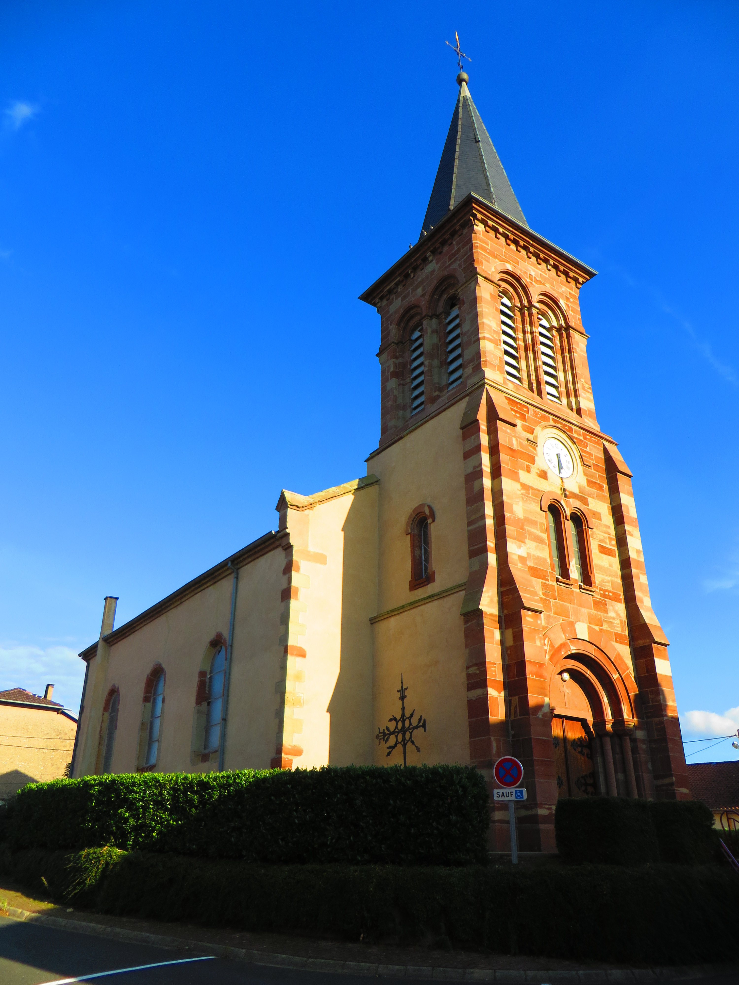 Guinzeling l'église de l'Invention-de-Saint-Étienne